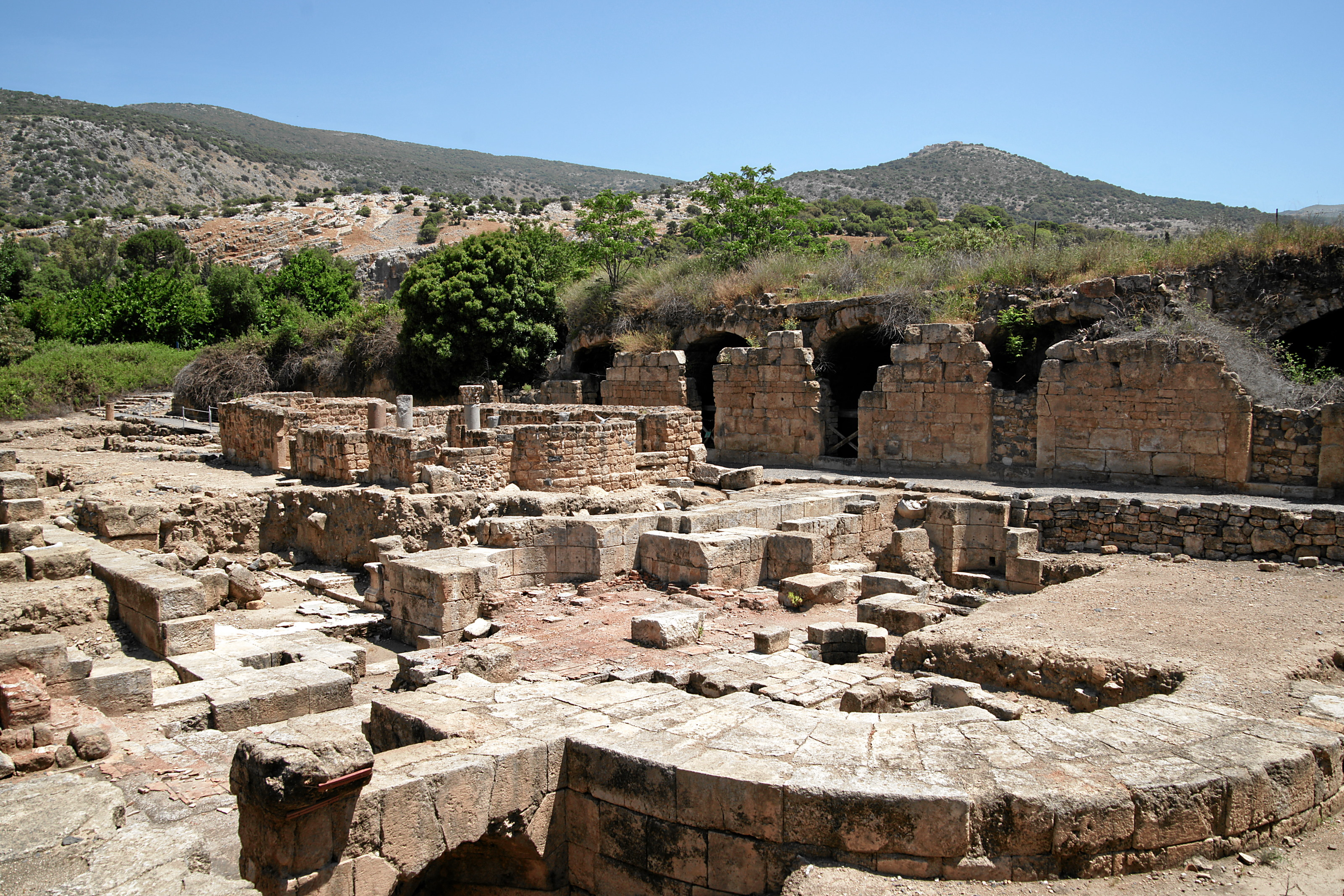 Caesarea Philippi: Ausgrabungsgebiet